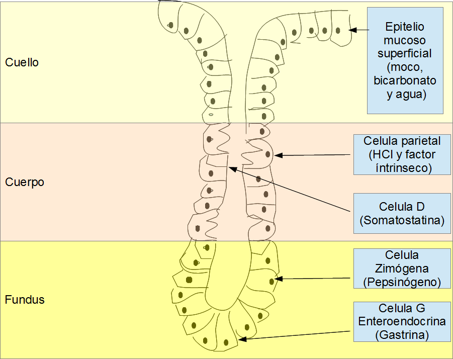 Dibujo grosero de un pliegue del estomágo humano, mostrando la distribución de las células que segregan componentes al jugo gástrico.